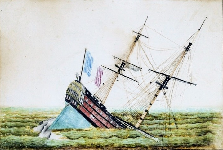 Le naufrage du vaisseau Le Républicain (ancien Royal Louis lancé en 1780) sur la roche du Mingant le 24 décembre 1794 alors qu'il sortait du port de Brest pour aller à la rencontre de la flotte anglaise ; il était alors en très mauvais état après avoir participé à la "bataille du 13 prairial an II" dite aussi "bataille d'Ouessant" au cours de laquelle il avait été démâté (dessin aquarelle et encre de Chine).